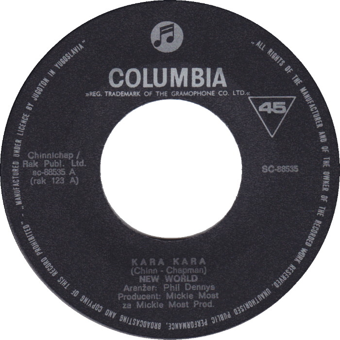 Single von Columbia Records (SC-88535) aus dem Jahr 1972.